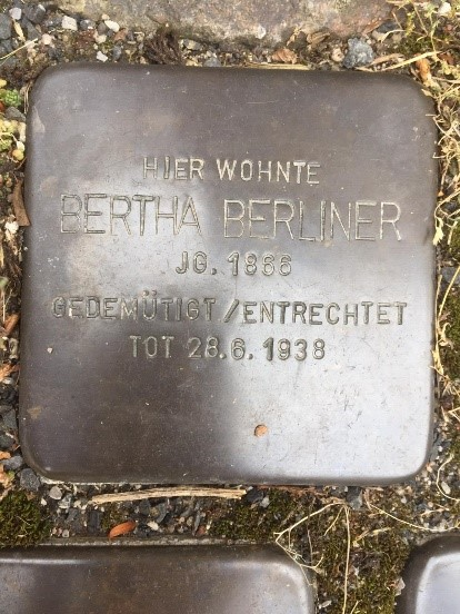 Stolpersteine